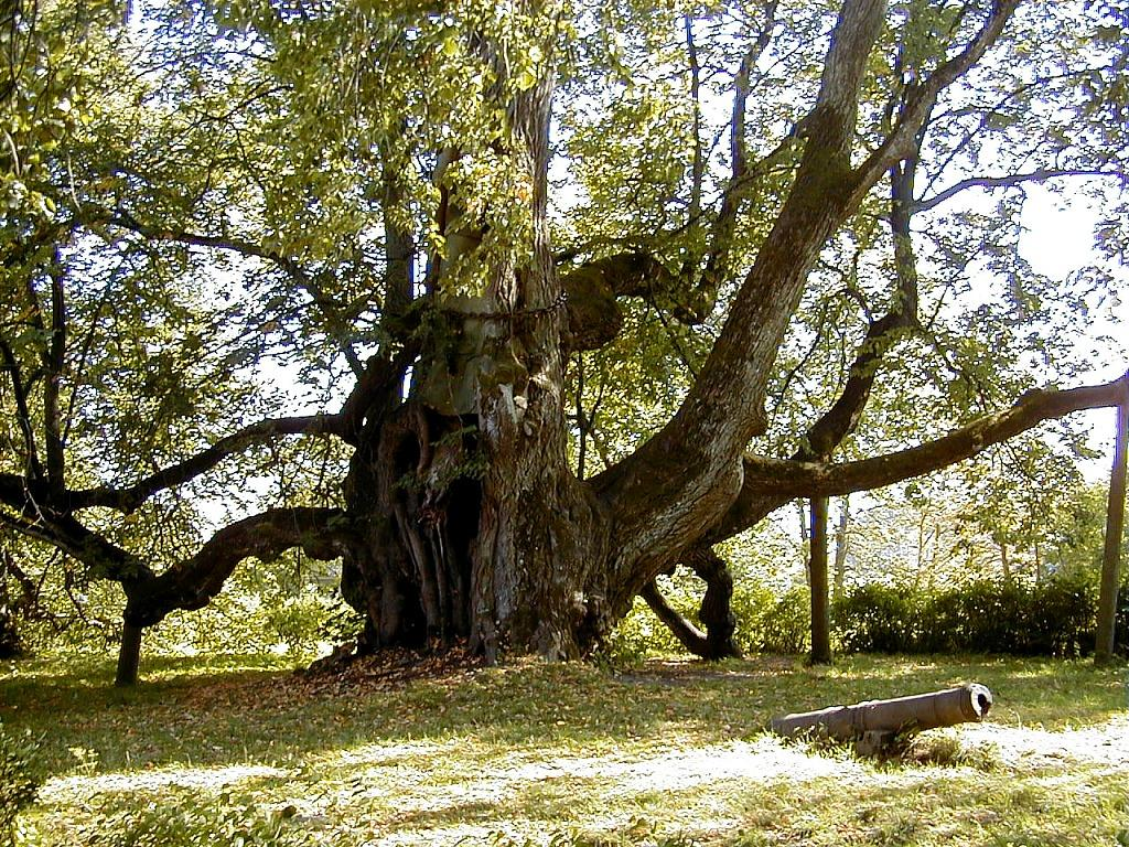 Valdemārpils, Elku liepa. 1999-09-04